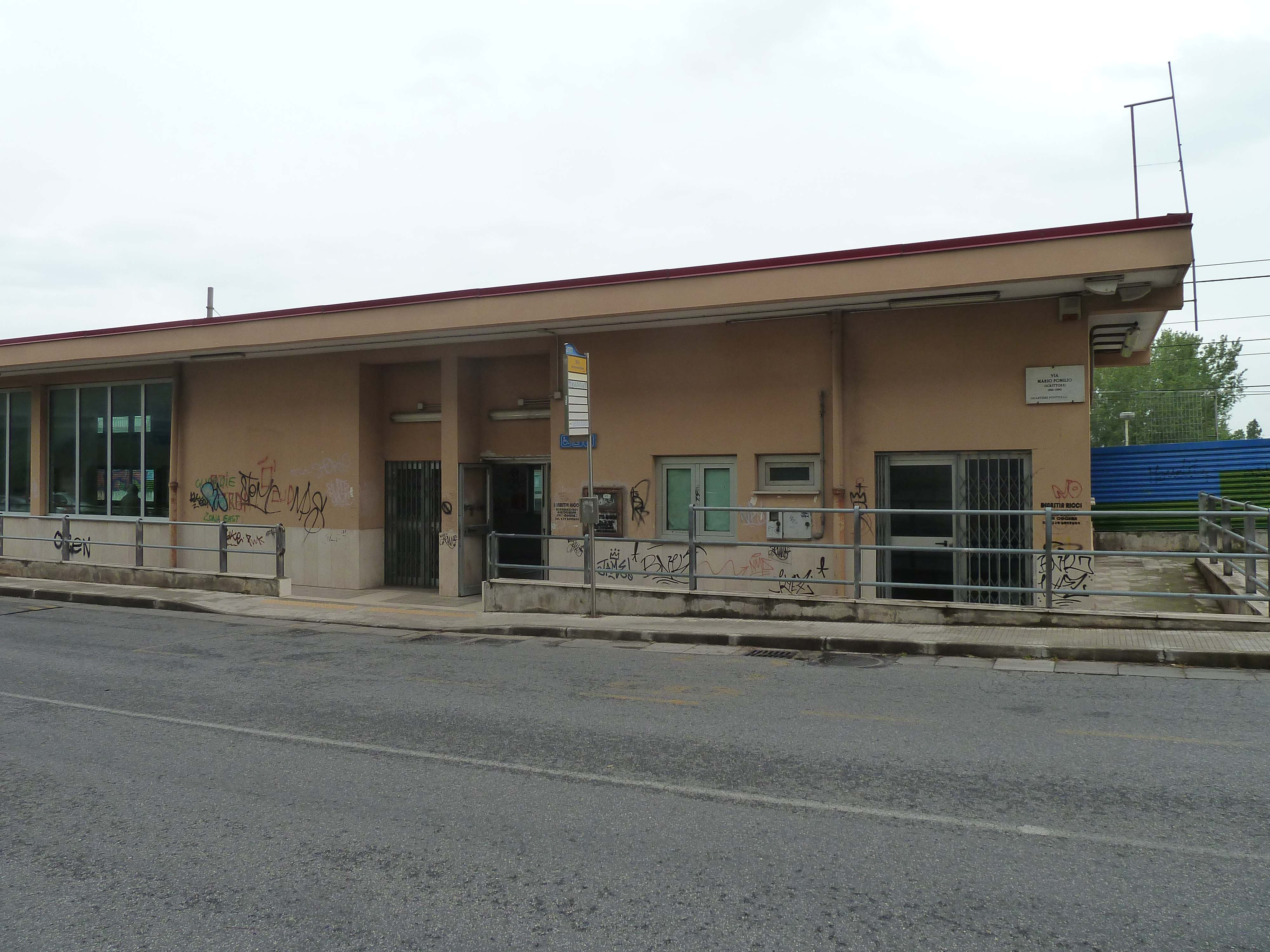 Stazione Vesuvio de Meis, stazione di interscambio tra le linee Napoli-Sarno e Botteghelle-San Giorgio, Circumvesuviana, EAV - esterno fabbricato viaggiatori lato Napoli-Sarno